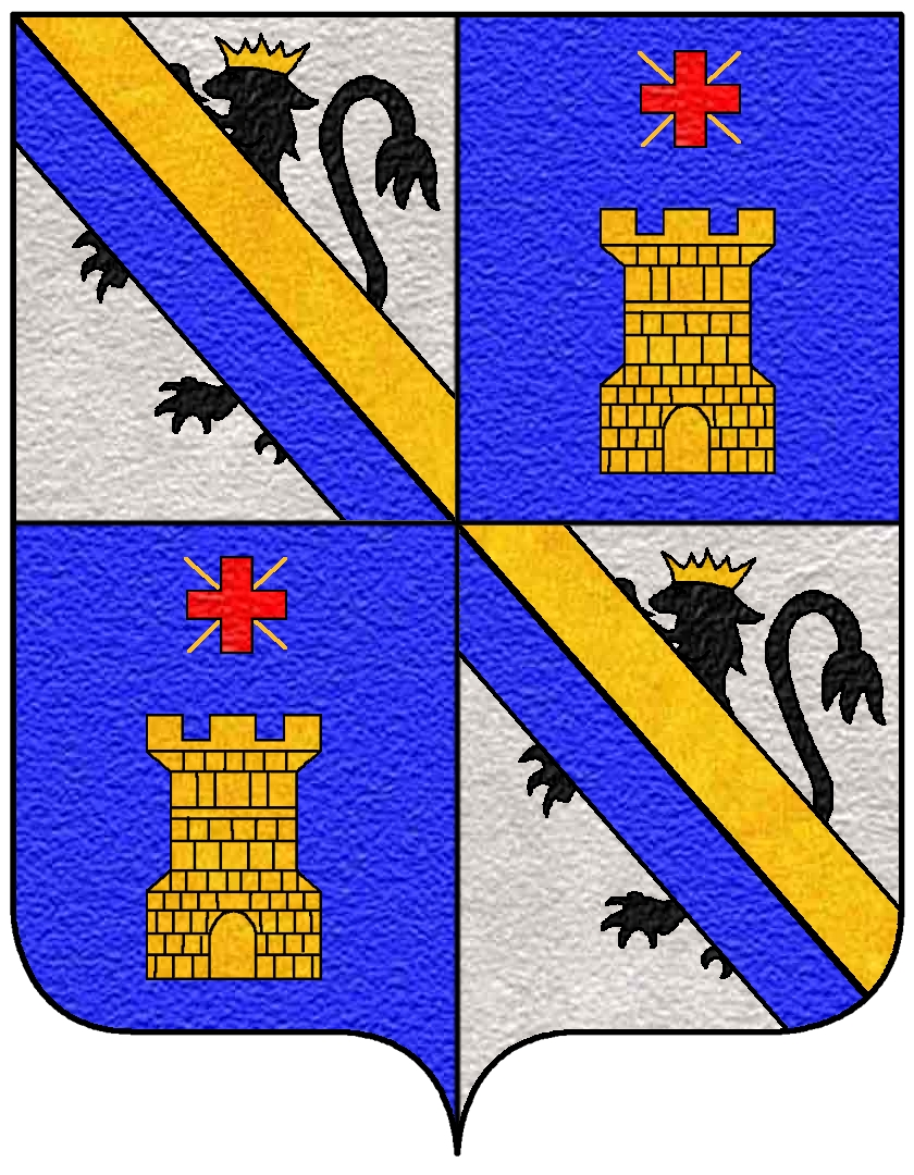 Stemma della famiglia Longhi